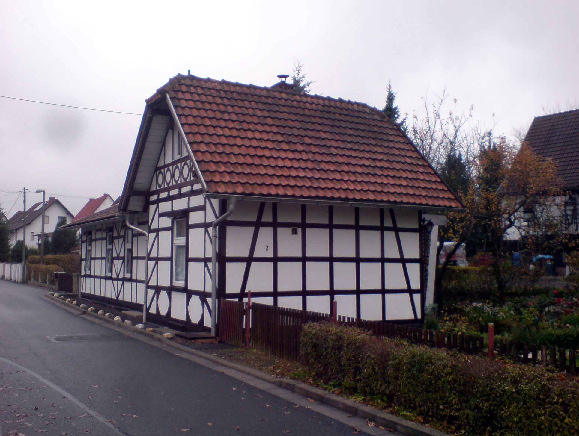 Straße: "Am Thomasberg" , Früher war diese Fachwerkhaus das Empfangsgebäude des Haltepunktes Eisfeld - Stadt